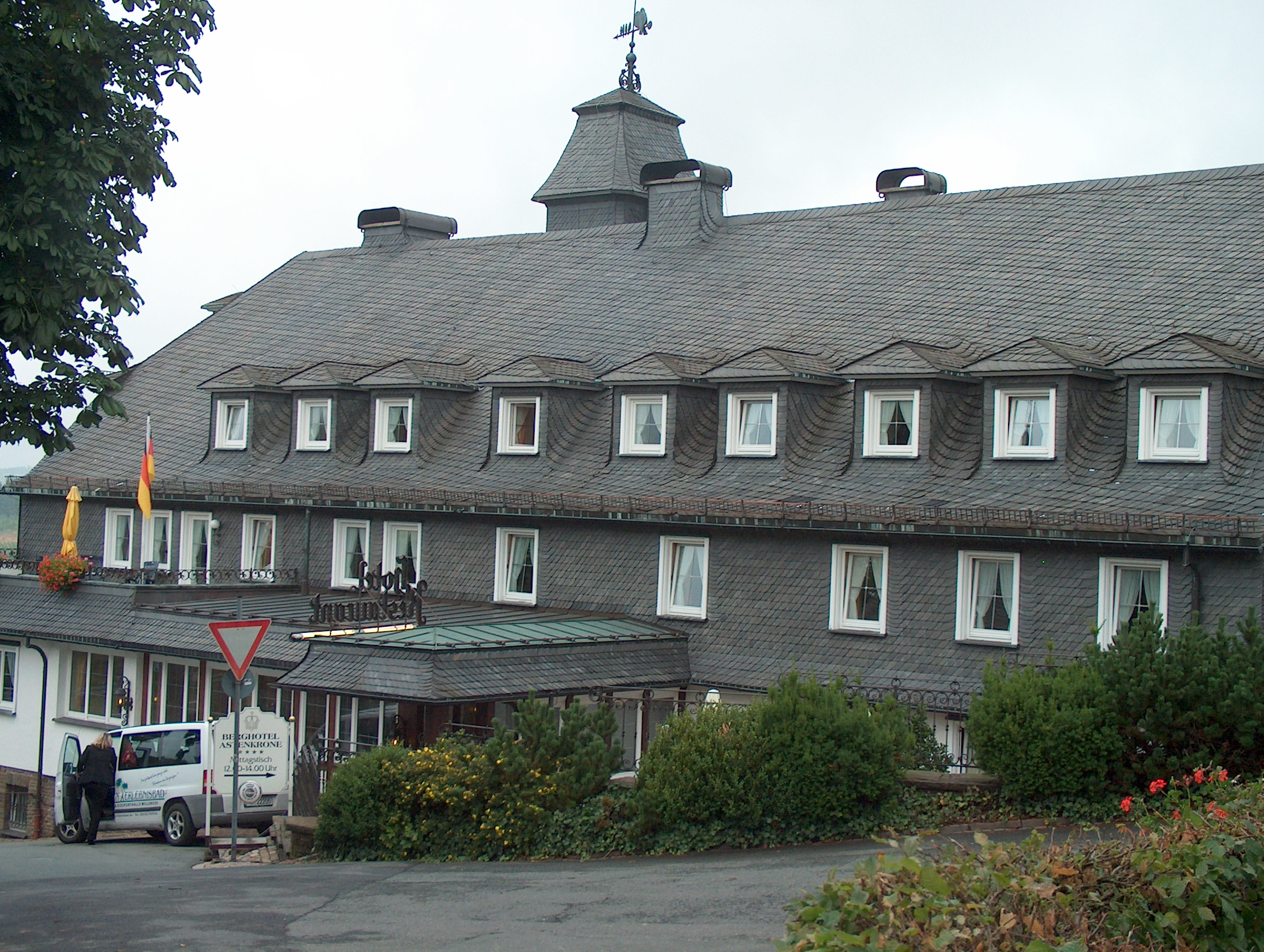 Berghotel Astenkrone in Winterberg-Altastenberg im Hoch-Sauerland-Kreis Nord-Rhein-Westfalen.